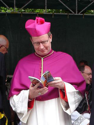 Zijne Hoogwaardige Excellentie Monseigneur Eijk, Bisshop of Groningen